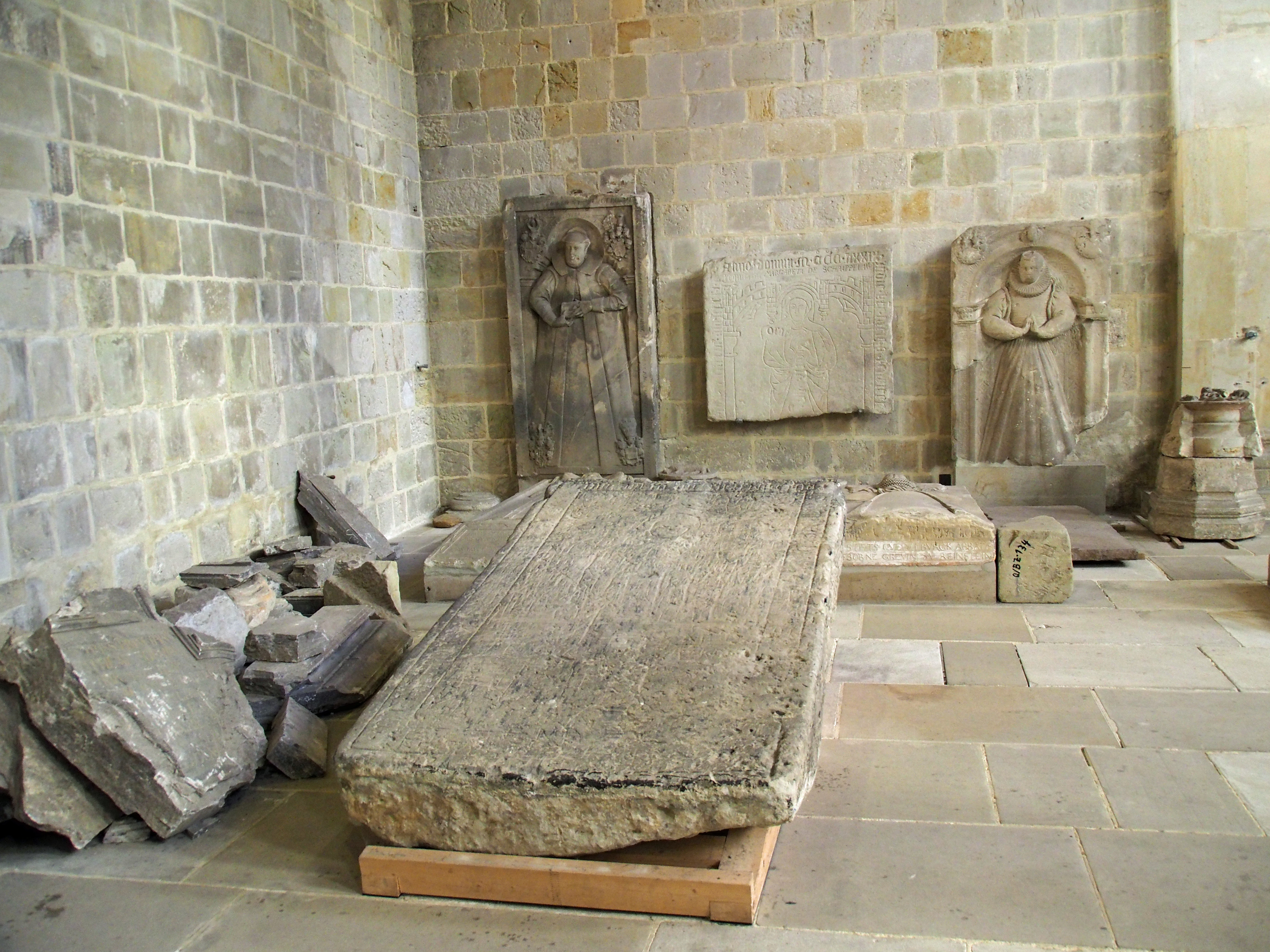 Grabplatten, unter anderen die der Äbtissin Margarete von Schraplau (Schrappelaw) († 1379), in der Stiftskirche St. Servatii Quedlinburg, Sachsen-Anhalt